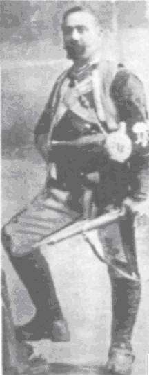 Михаил Радев Странджата.